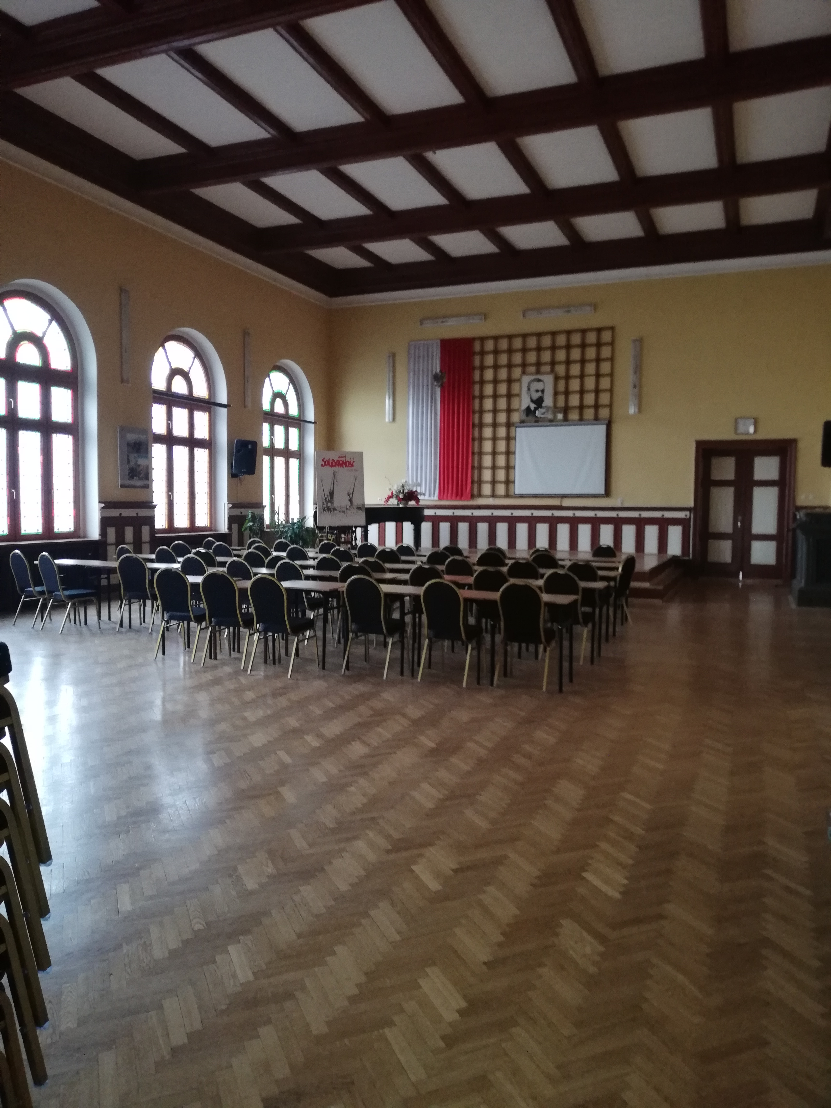 Aula w Liceum w Giżycku